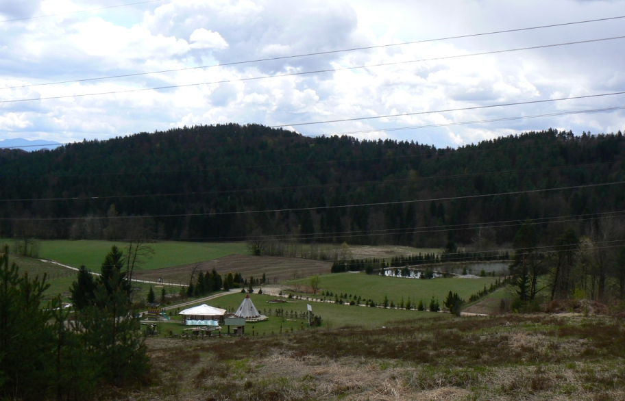 Zemljišče kjer je bil izveden nedovoljeni poseg.